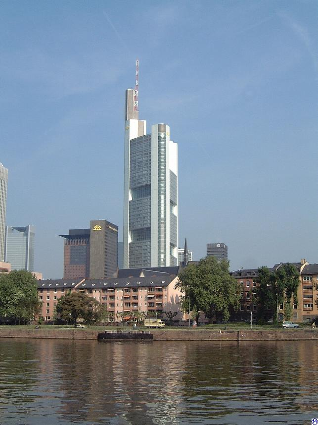 Hauptverwaltung der Commerzbank in Frankfurt